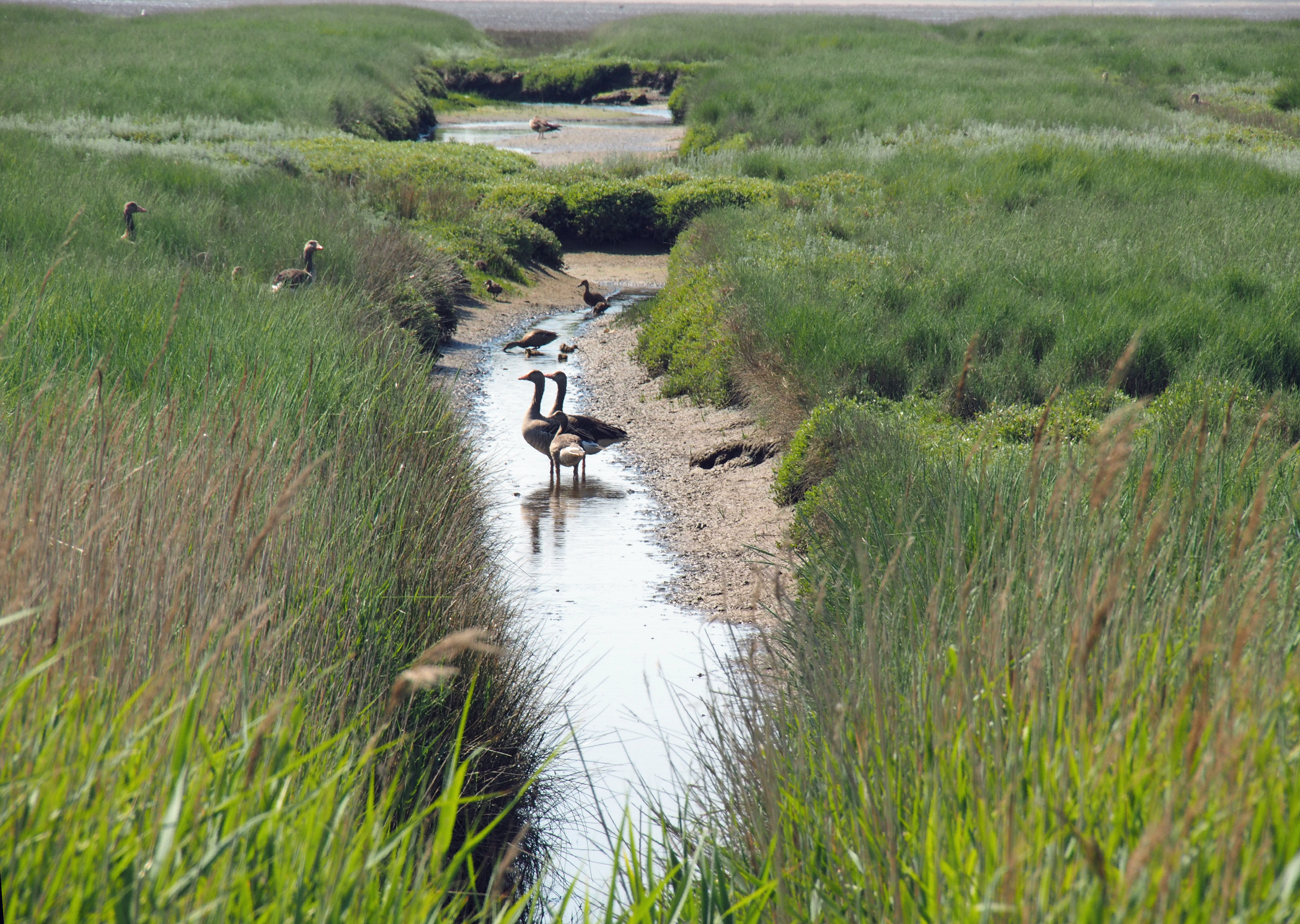 Salzwiesen im Westteil der Insel Juist